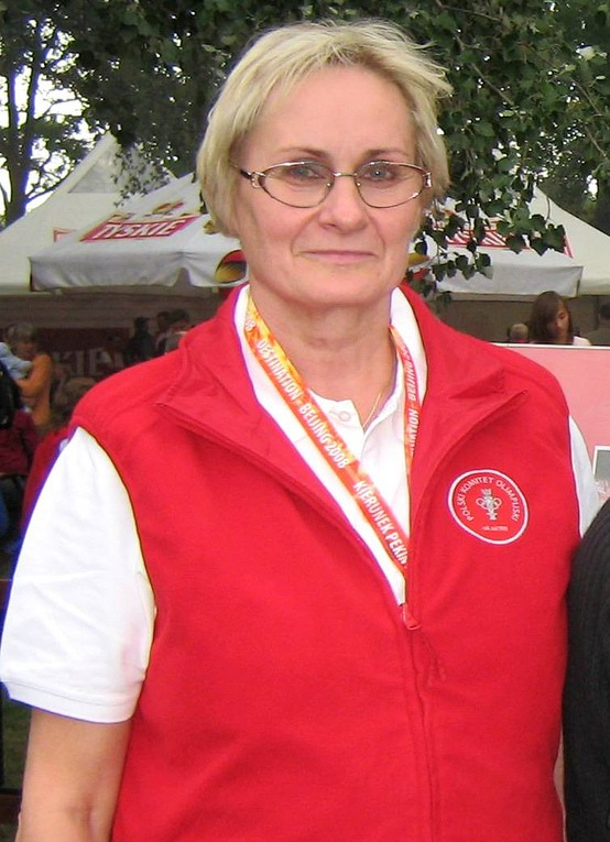 Halina Aszkiełowicz, po mężu Halina Woyno (ur. 4 lutego 1947 w Słupsku), polska siatkarka, brązowa medalistka Letnich Igrzysk Olimpijskich w 1968 r. w Meksyku.